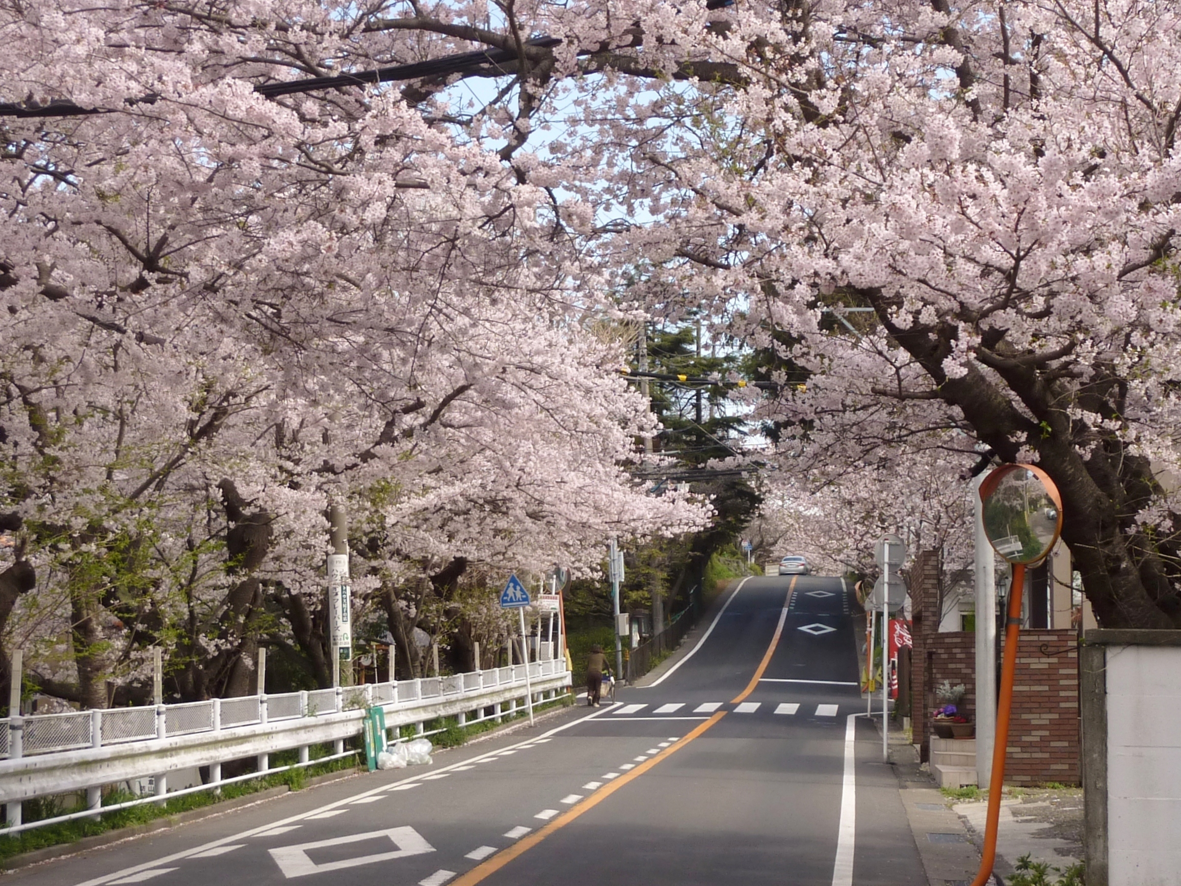 鎌倉市鎌倉山の桜並木